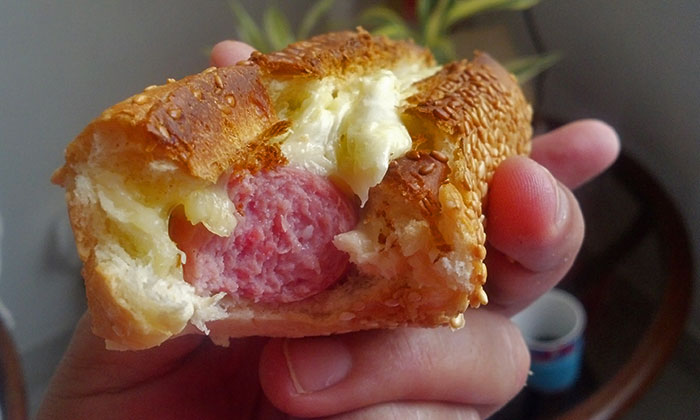 chaparrita, sándwich hecho con pan de hot-dog, salchicha y queso caliente, original de Chile.